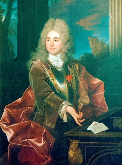 Portrait dit du marquis de Prye, ambassadeur à Turin.